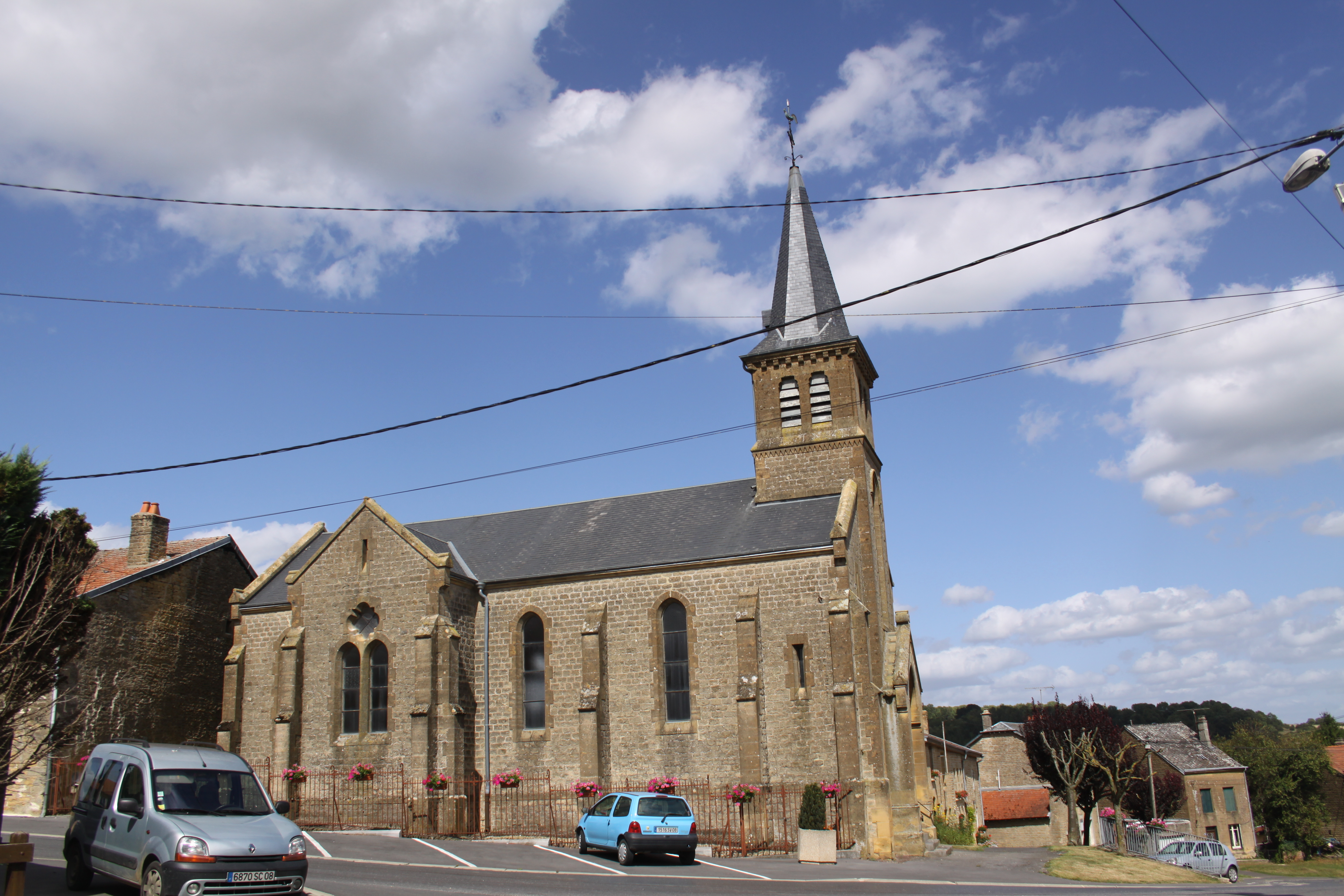 Village Ardennais